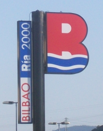 Cartel de Bilbao Ría 2000 en Baracaldo